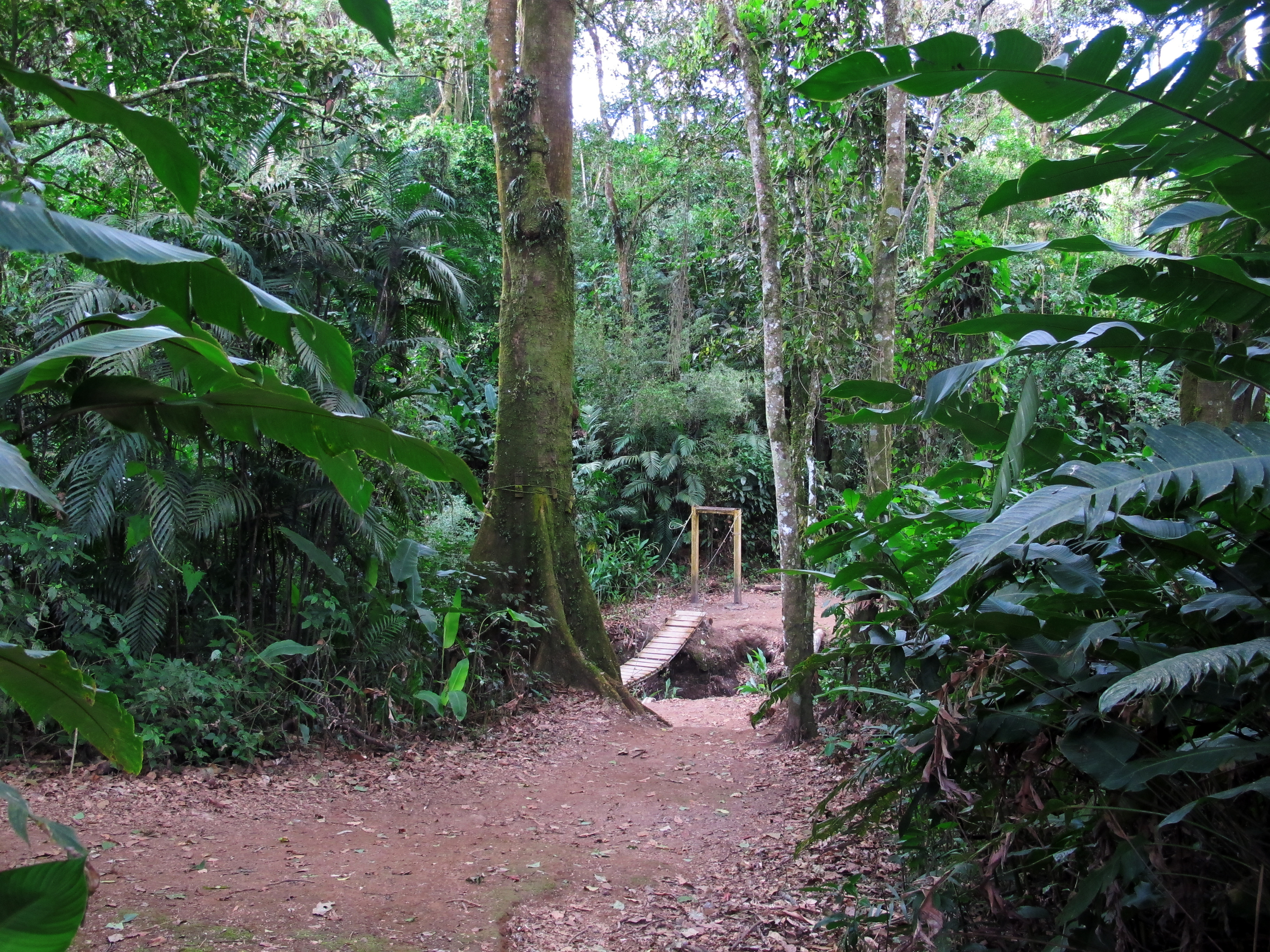 Parque del Este i distriktet San Rafael i kantonen Montes de Oca i Costa Rica